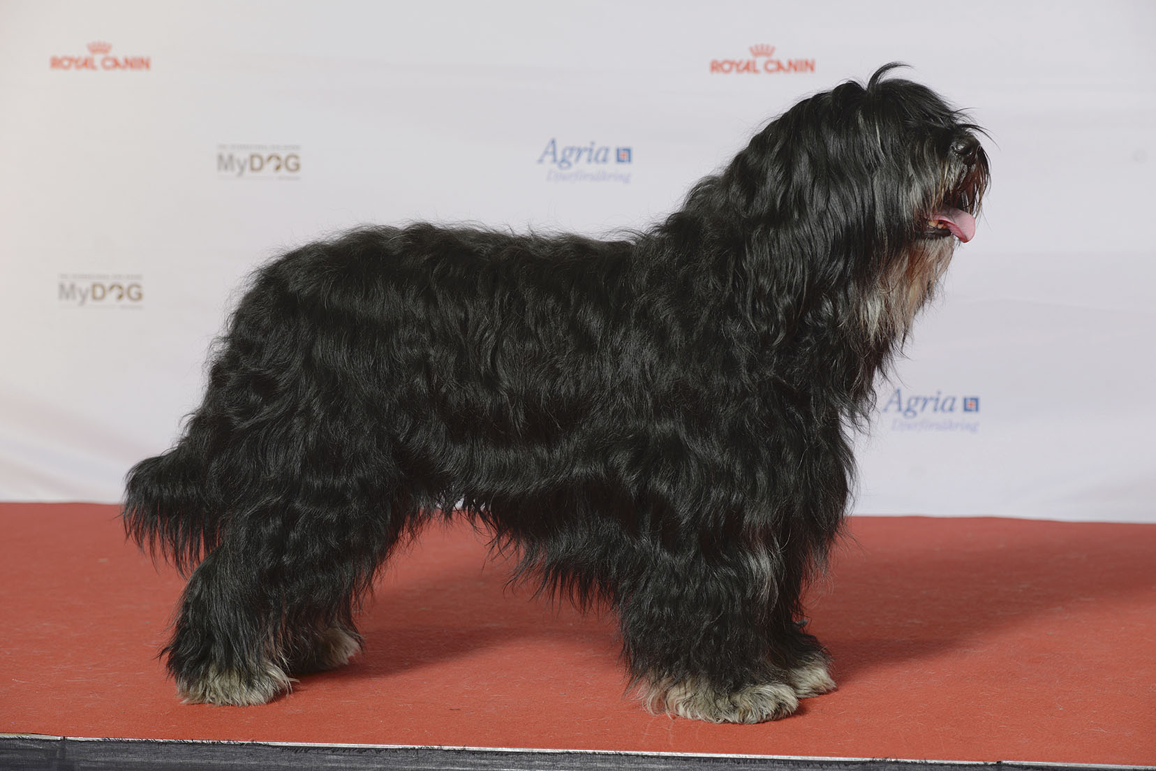 Grupp 9, CHINESE CRESTED DOG, Tournais Wicked Bubble Witch Saga MyDOG, nordens största hundevenemang.